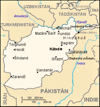 Orientační mapa Afghánistánu.